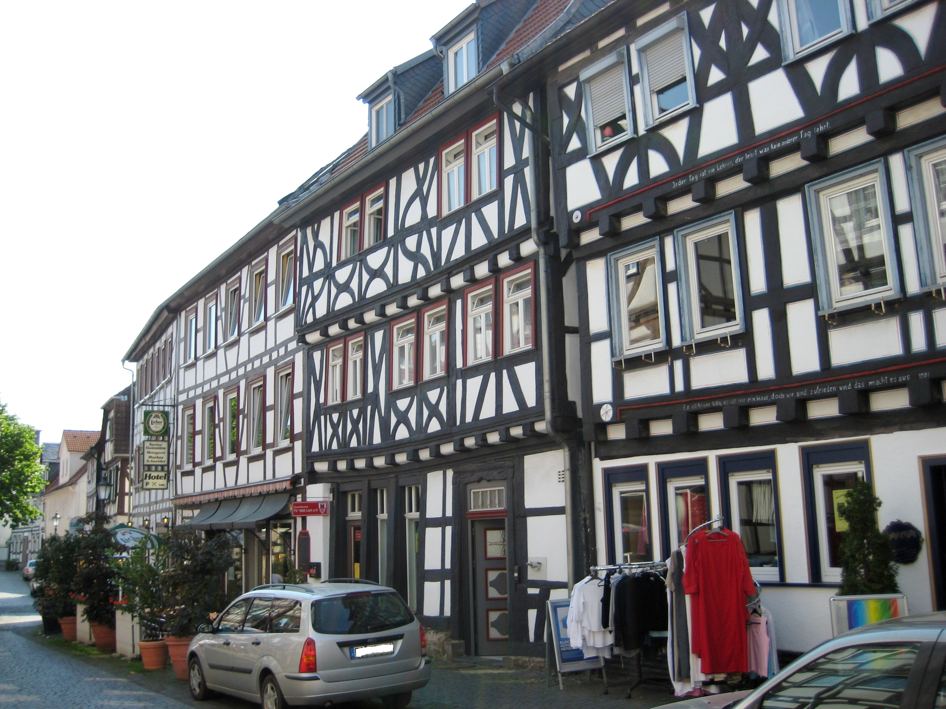 Fachwerkfassaden in der Oberstadt